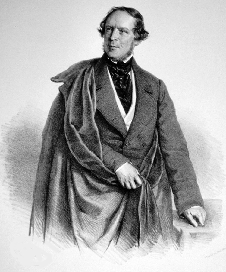 Friedrich Halm, Lithographie von Josef Kriehuber, 1858